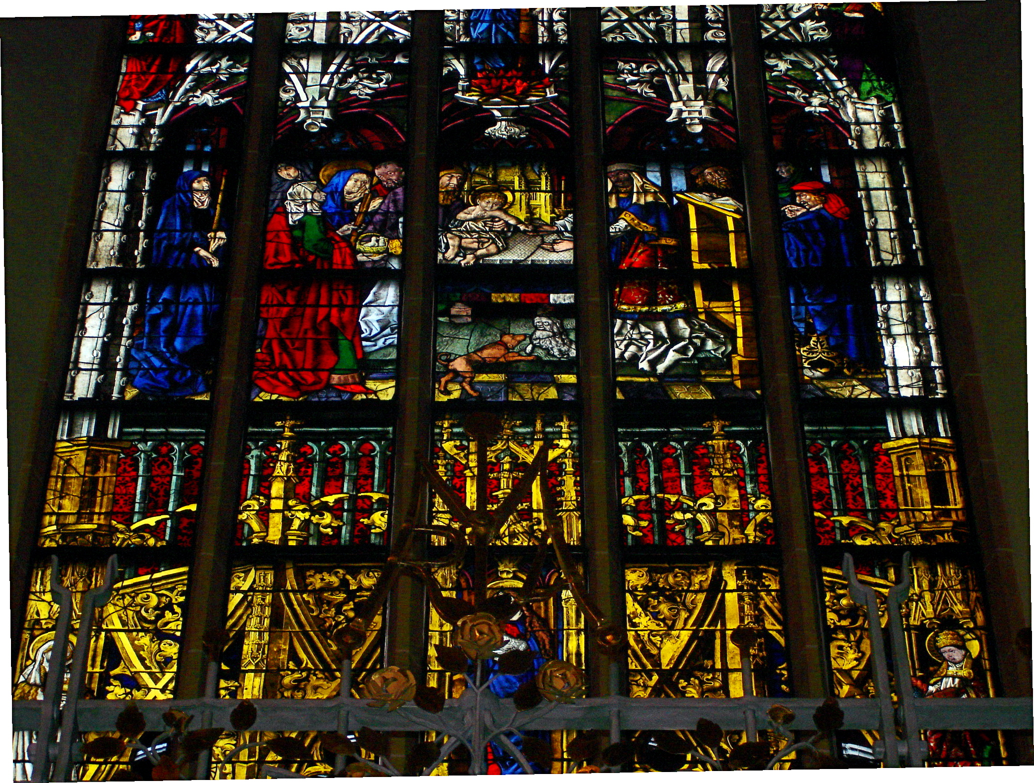 Darstellung des Herrn im Chorhauptfenster von Peter Hemmel von Andlau, 1493